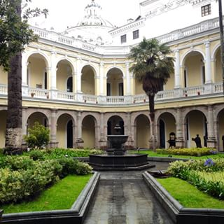 Interior del patio de la Biblioteca Municipal